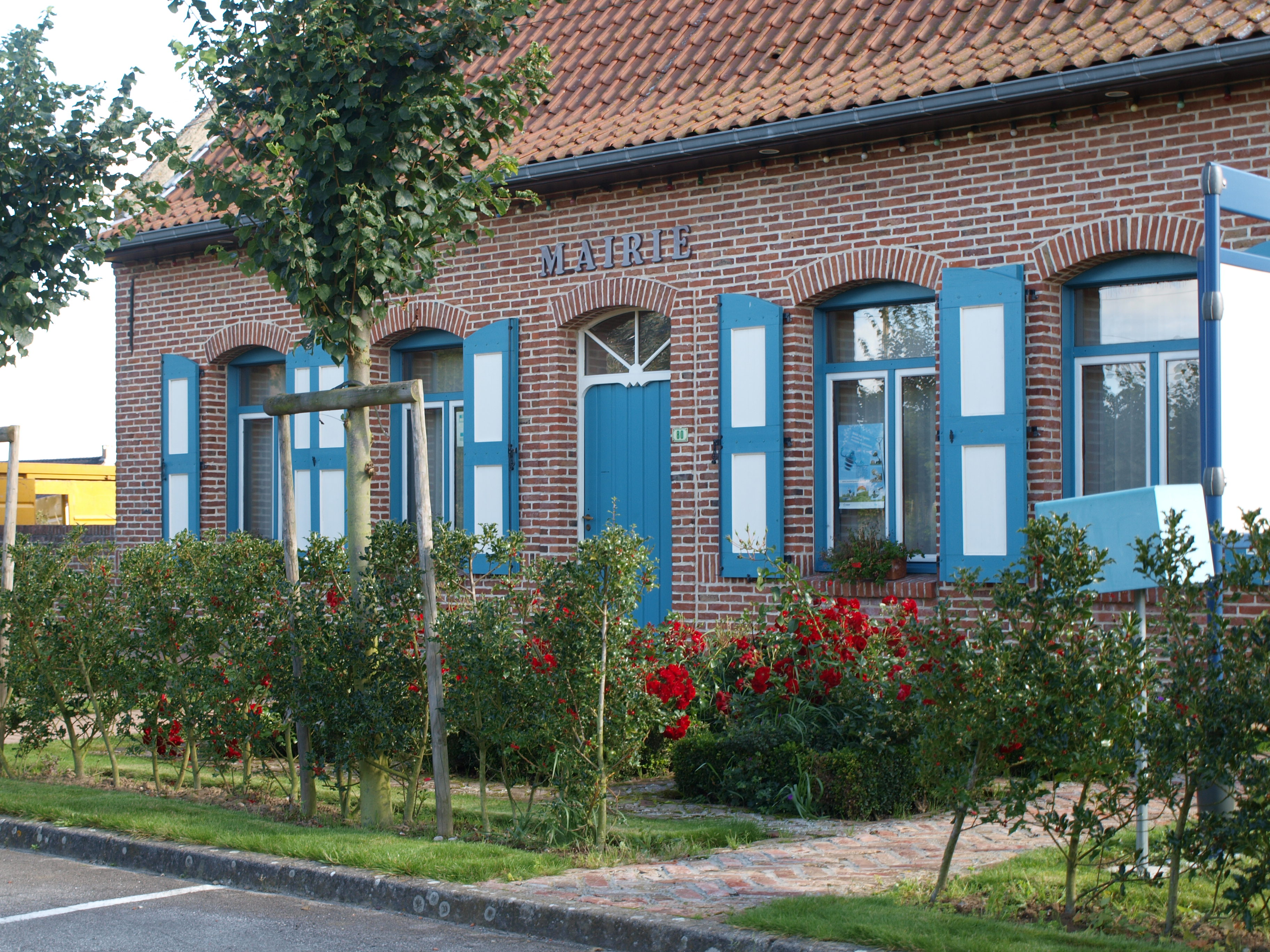 La Mairie